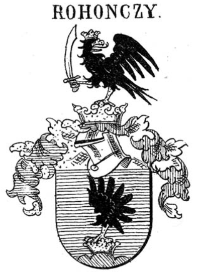 A felsőpulyai Rohonczy család cimere